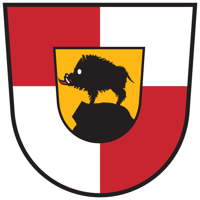 Wappen von Eberstein